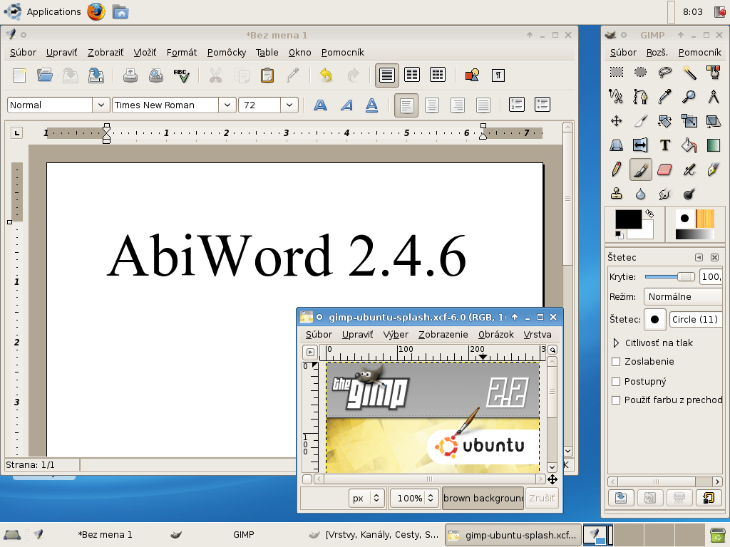 Xubuntu - AbiWord a GIMP